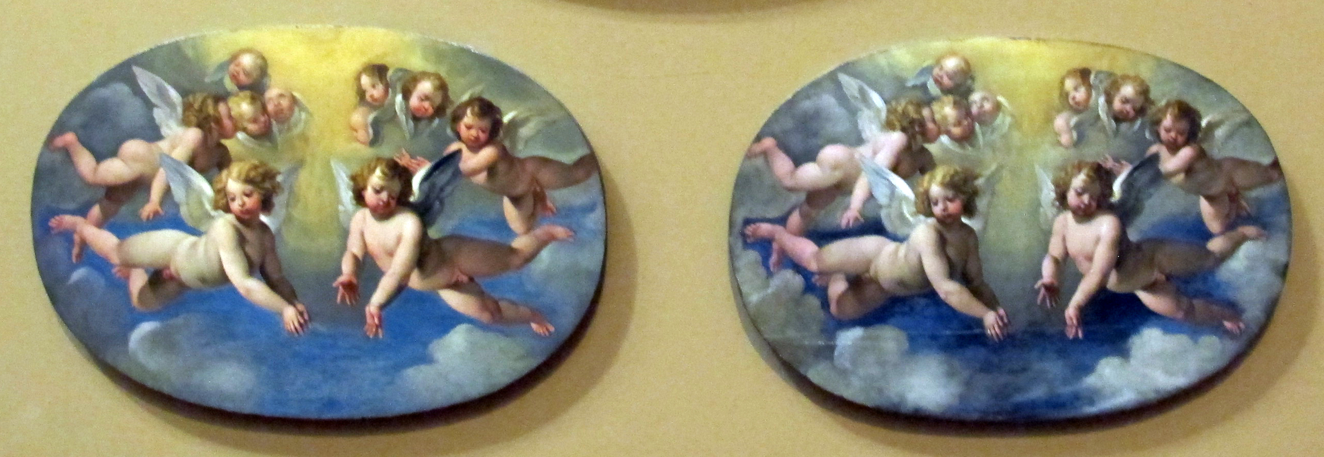 Galleria Napoletana (Museo di Capodimonte)